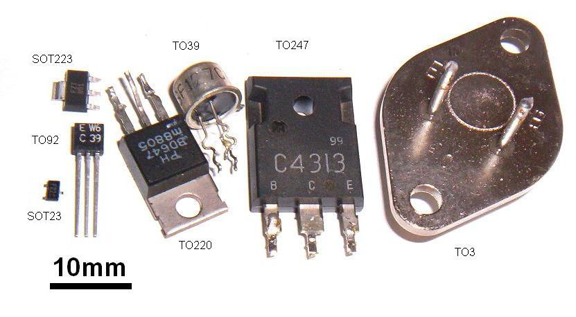 Bauformen von Bipolartransistoren; Transistoren aus dem Kombinat Mikroelektronik: SF127C im TO39-Gehäuse, SC239E im "Miniplast"-Gehäuse (im Bild fälschlich als TO92 bezeichnet)